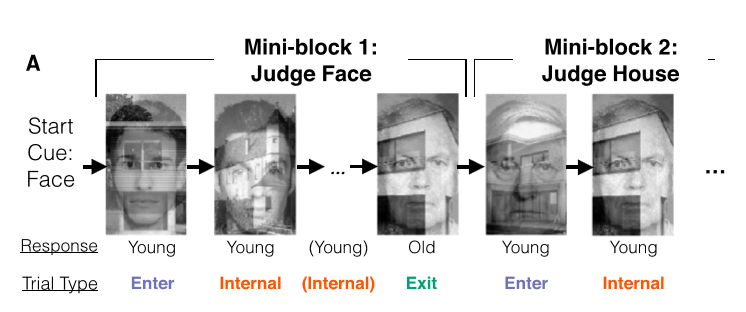 ヤエル・ニブの顔家課題